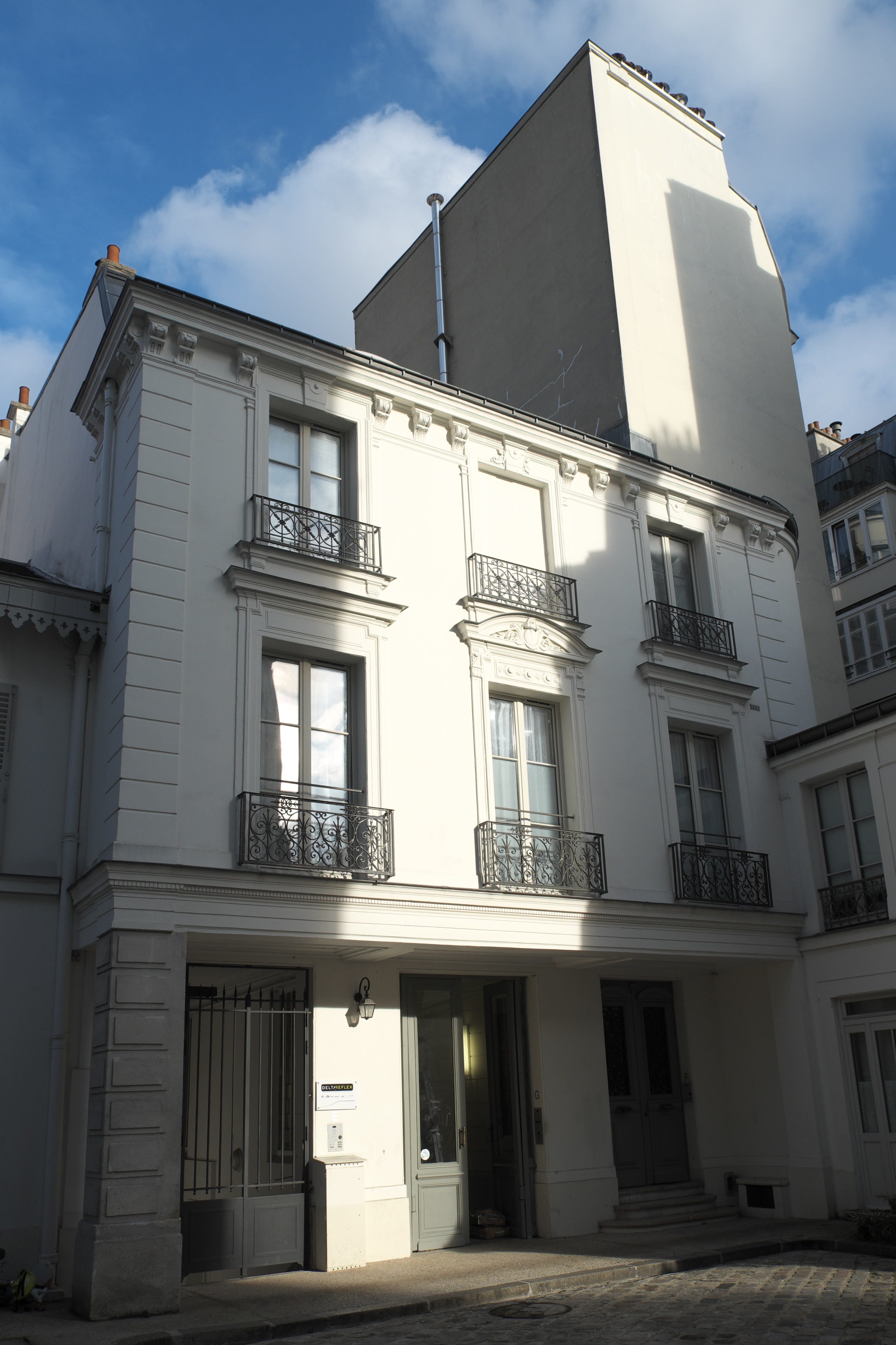 Villa des Arts im 18. Arrondissement in Paris (Île-de-France/Frankreich)